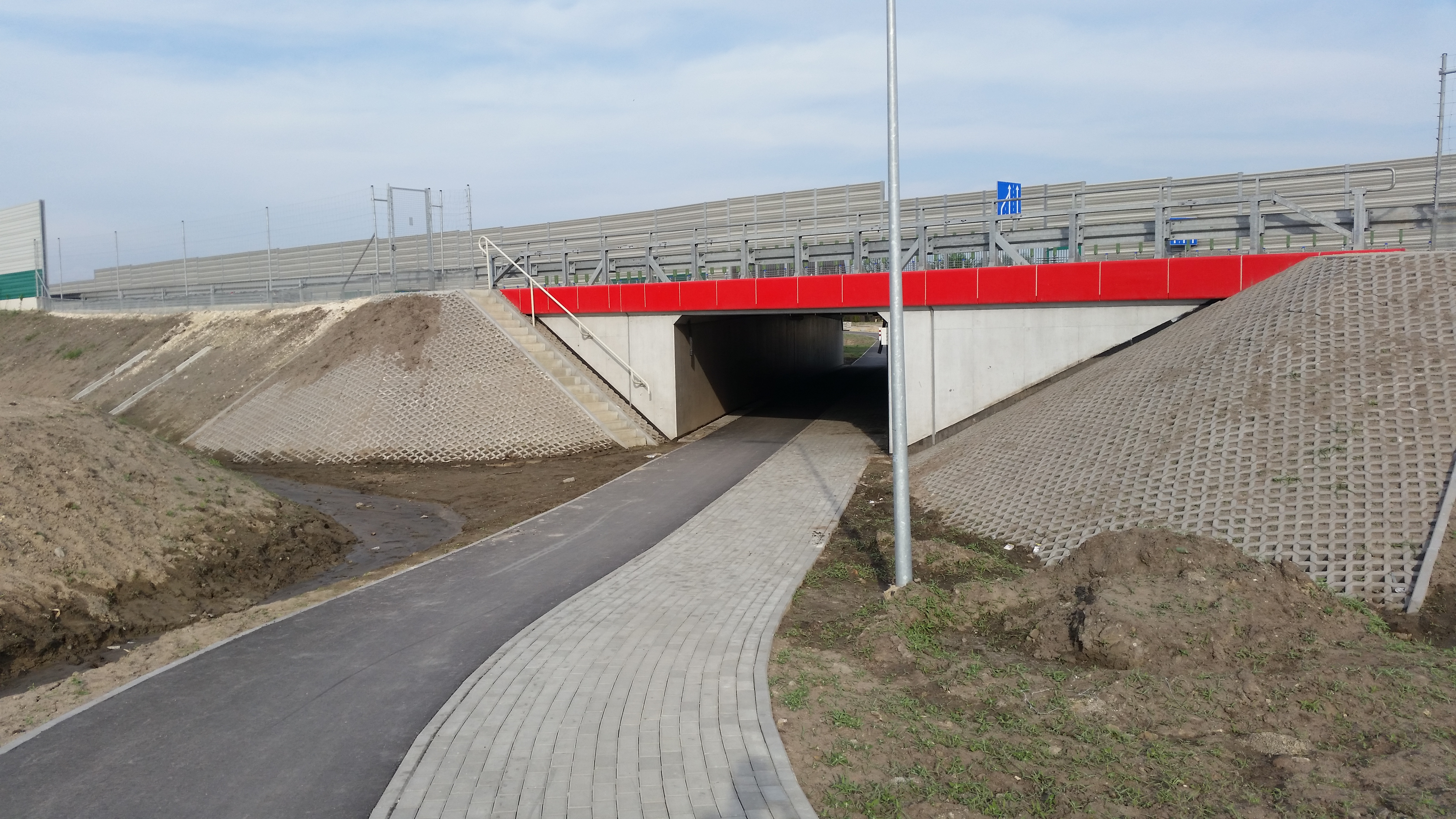 Przejście dla pieszych i przejazd dla rowerzystów pod Obwodnicą Marek w miejscowości Dybów-Kolonia, blisko granicy z miastem Radzymin (okolice ulicy Słowackiego w Radzyminie).